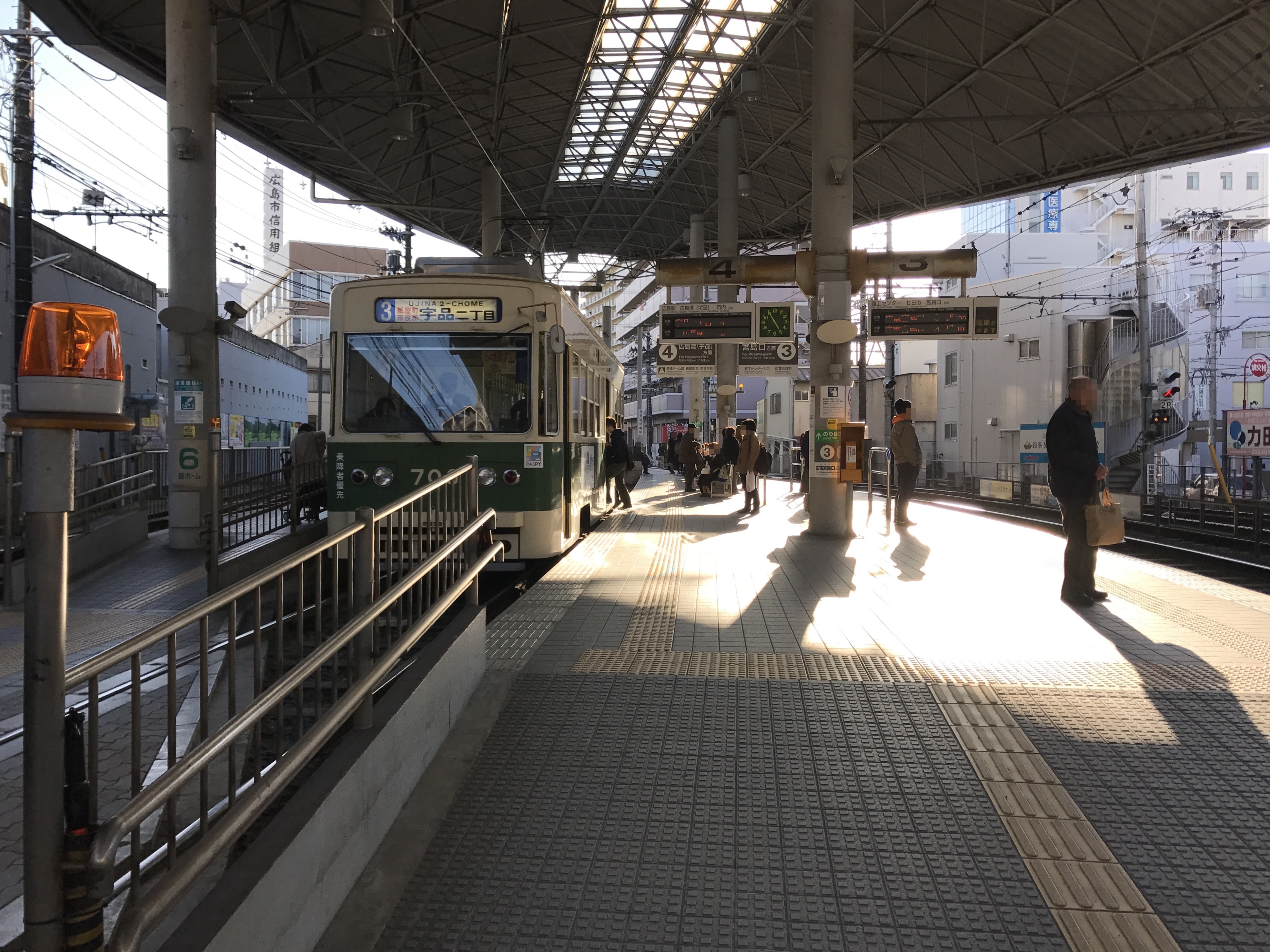 広電西広島駅のホーム(奥は東高須方面)